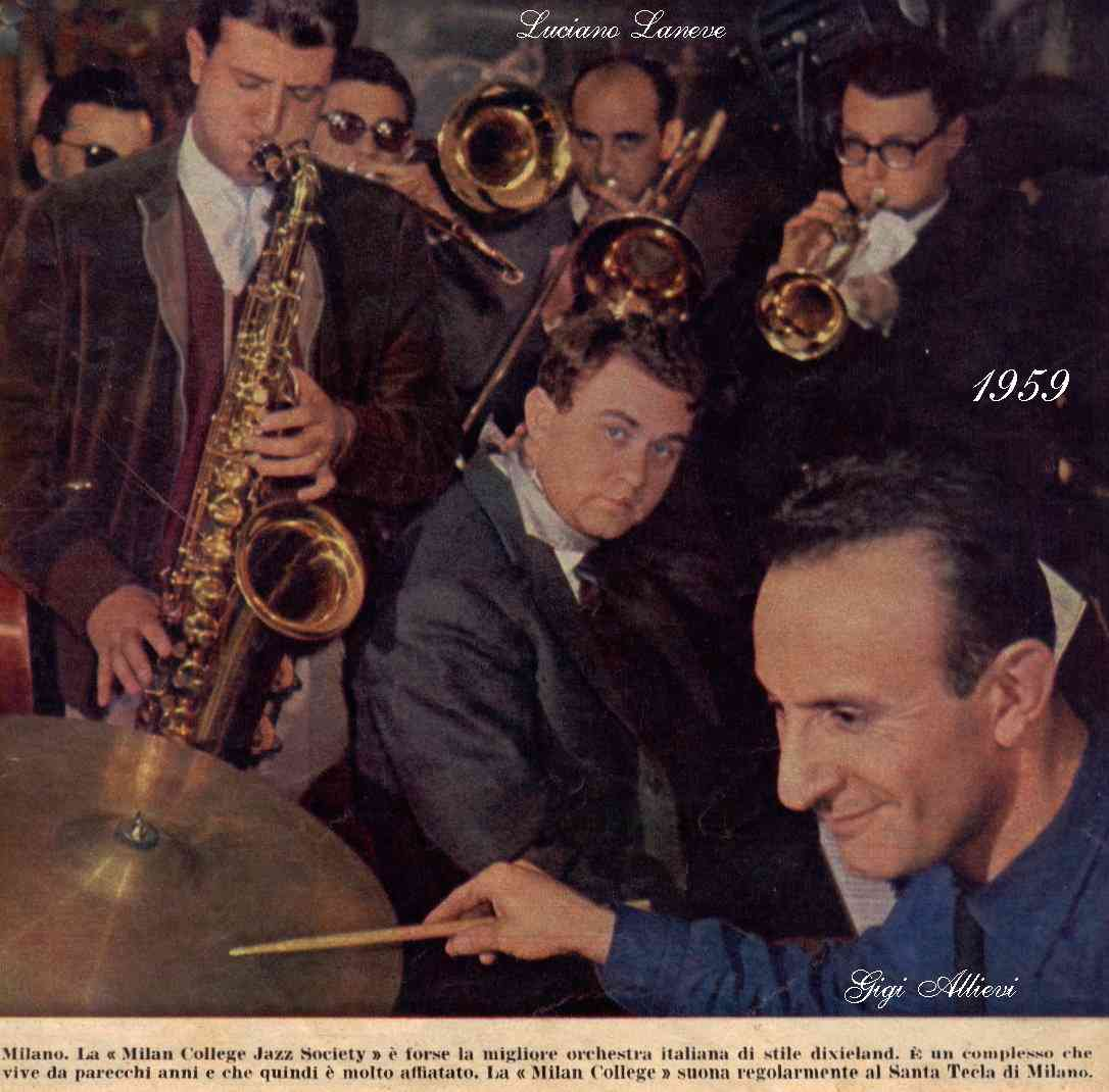 La "Milan College Jazz Society" suona regolarmente al Santa Tecla a Milano - fotografia pubblicata sul settimanale politico d’attualità L’EUROPEO Anno XV N.8 del 22 Febbraio 1959 a corredo dell'articolo di Roberto Leidi "I profeti in blue-jeans scendono nelle cantine"